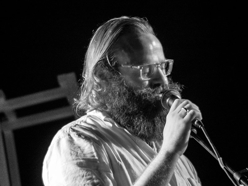 Jens Blendstrup optræder sammen med Girls in Airports til U Jazz i Aarhus 2014